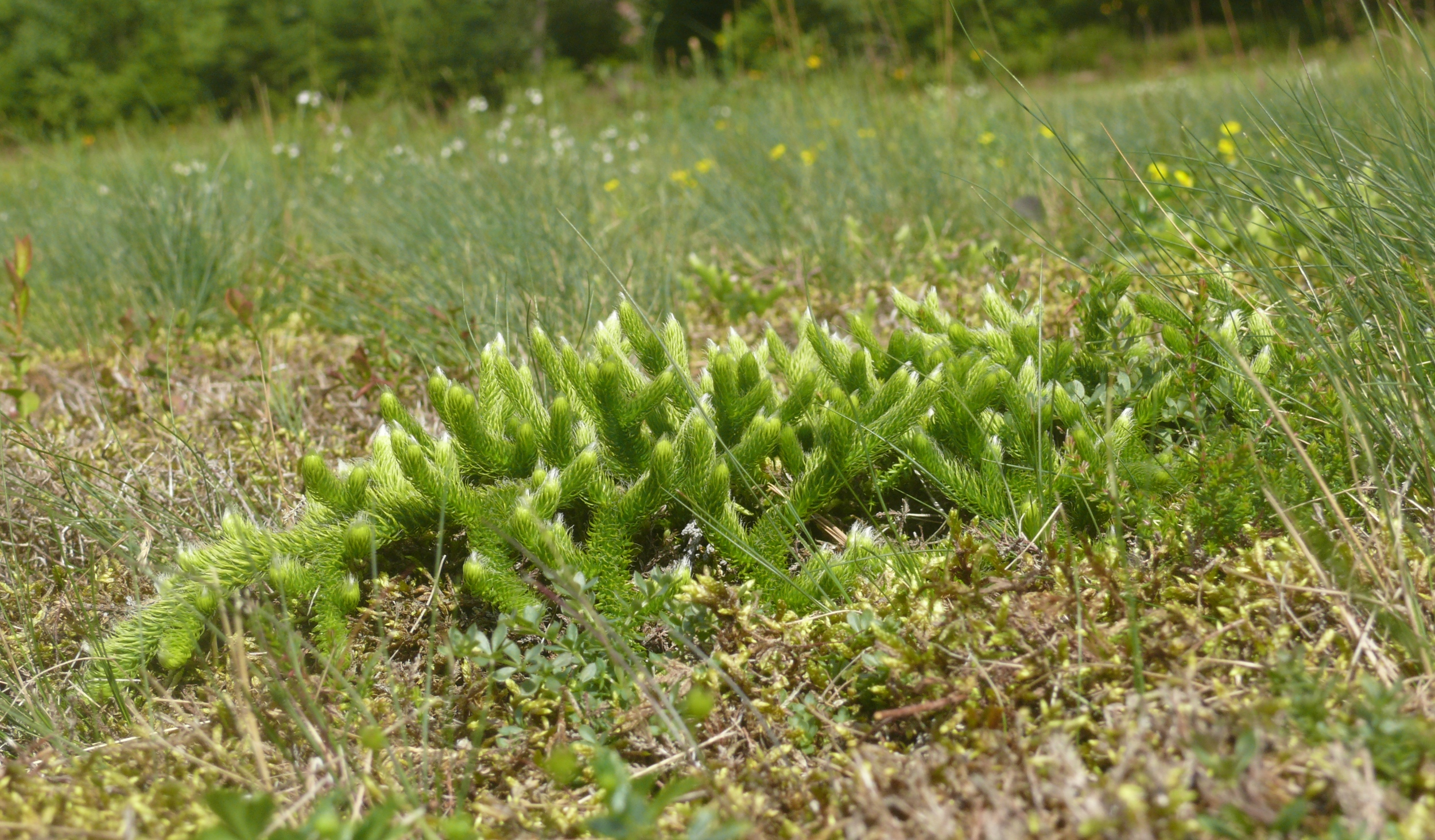 Lycopodium clavatum,Nordschwarzwald, Deutschland